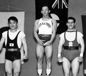 Kenji Onuma, Tan Howe Liang, Henrik Tamraz 1958 Asian Games (weightlifting, 67.5 kg)